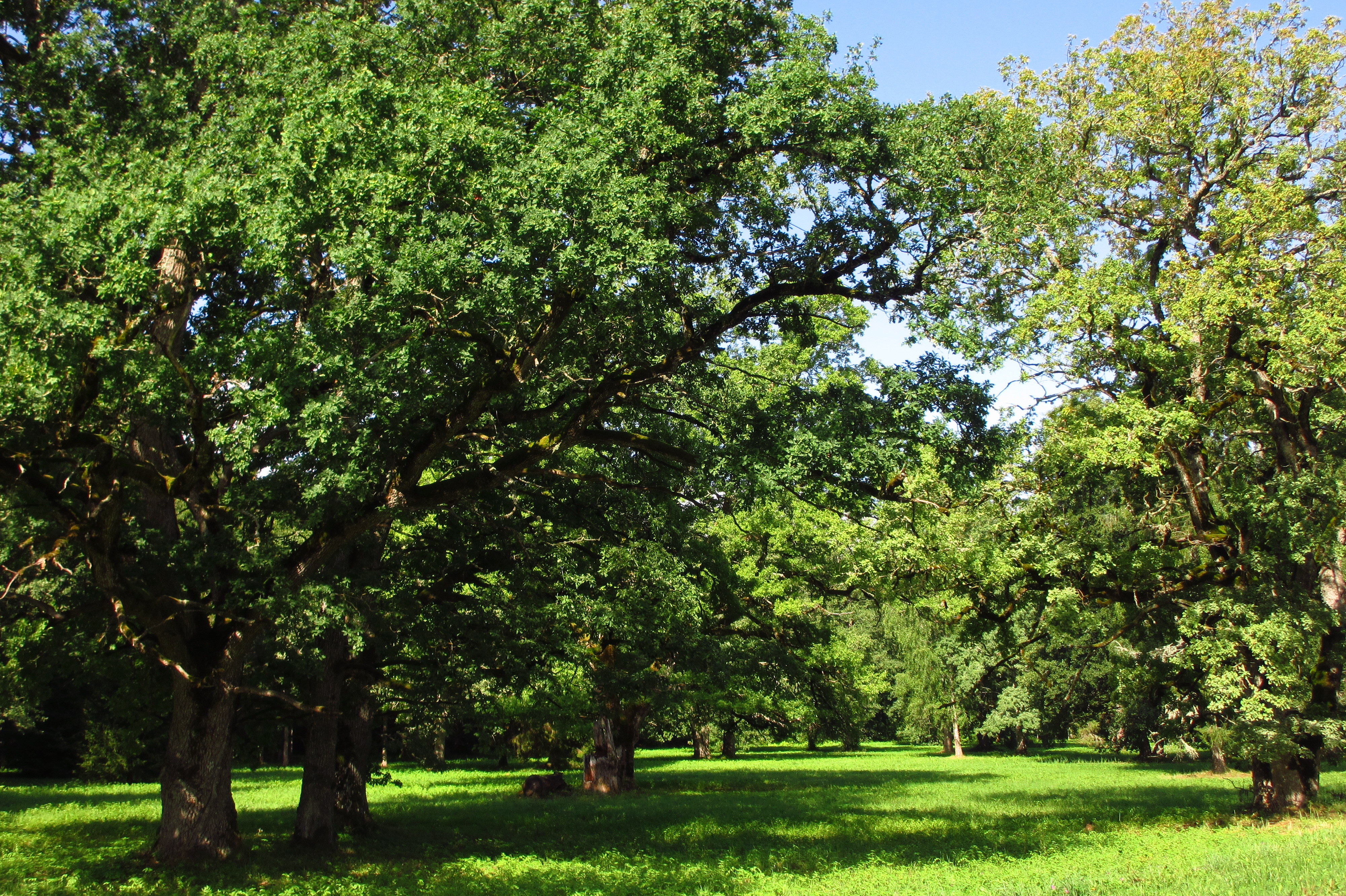 Vana-Vigala park ja Hirvepark; Vana-Vigala park ja Hirvepark koos puiesteedega